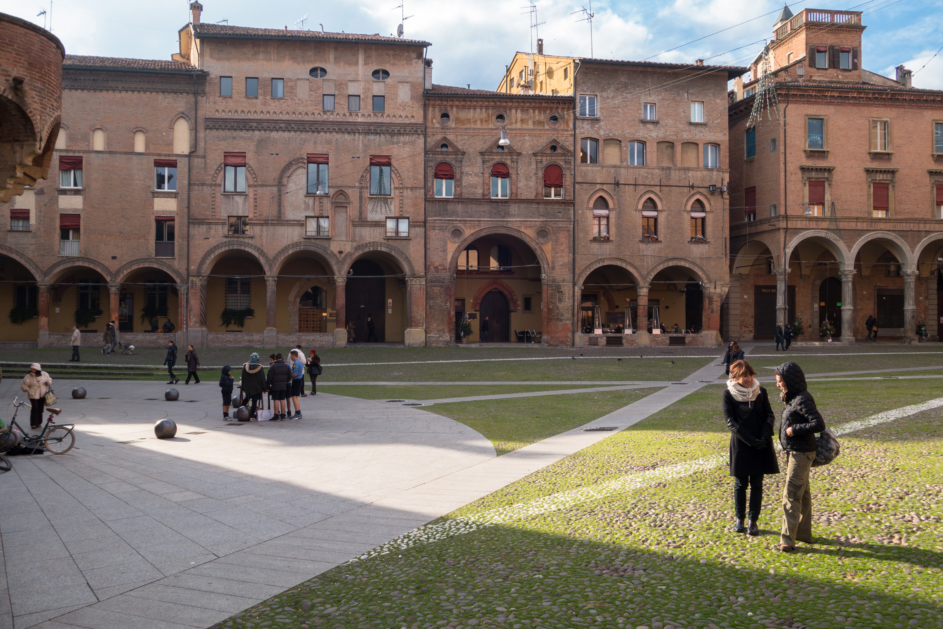 Piazza Santo Stefano This is a photo of a monument which is part of cultural heritage of Italy.